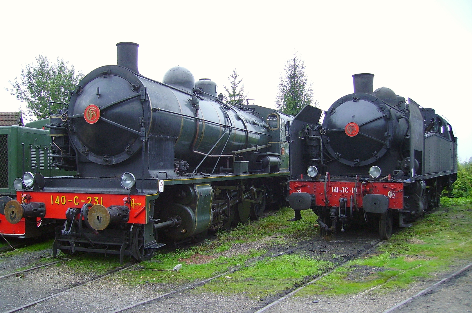 La 140 C 231 et la 141 TC 19 au dépôt de Longueville le 16 septembre 2006.